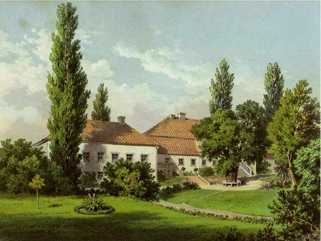 Dwór w Ogrodzieńcu.